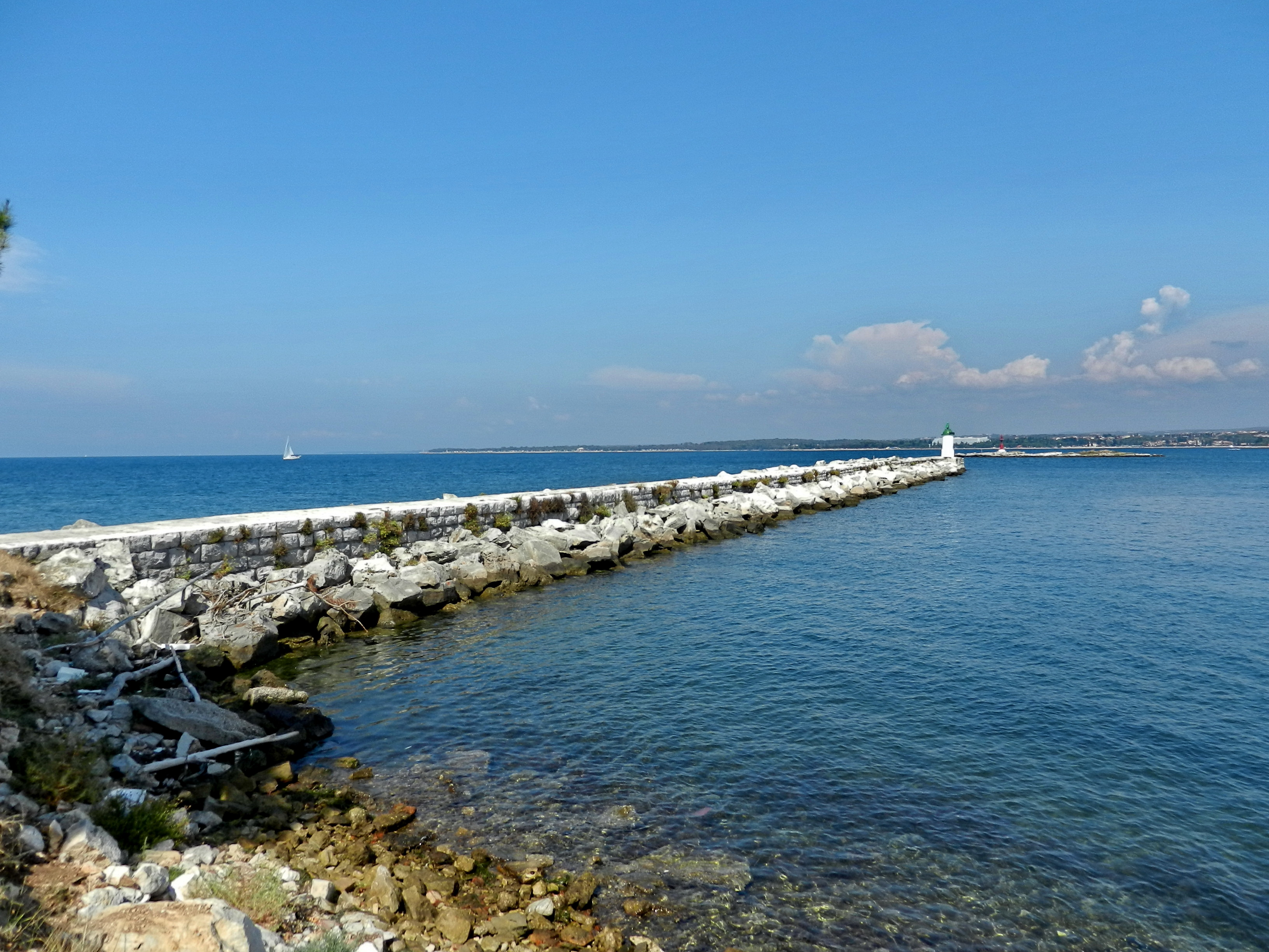 Sv Nicola Porec